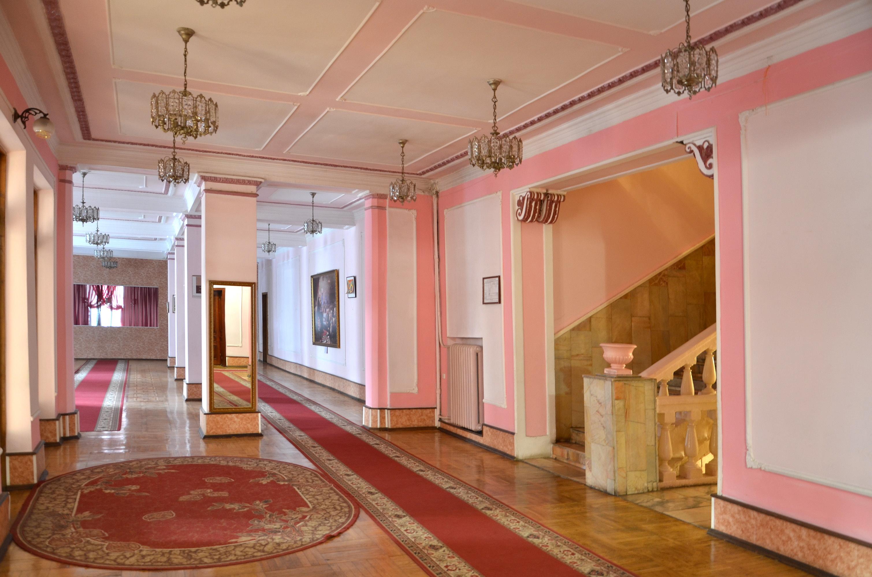 Колишній будинок «Міщанського братства», нині — приміщення Тернопільської обласної філармонії. Вестибуль.